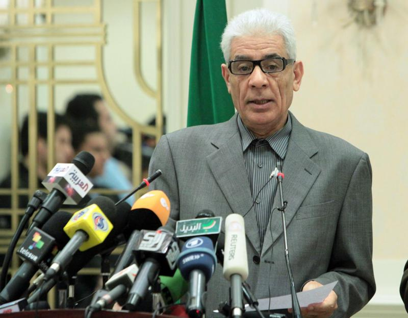 [Essam Mohamed] Foreign Minister Moussa Koussa claimed that Libyan forces were observing a ceasefire. وزير الخارجية موسى كوسا قال إن القوات الليبية تحترم وقف إطلاق النار Moussa Koussa, Ministre libyen des Affaires Etrangères, avait affirmé que les libyens observeraient un cessez-le-feu. Full story: القصة L'article